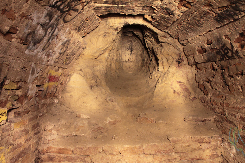 Une arête creusée à la recherche d'un double fond.